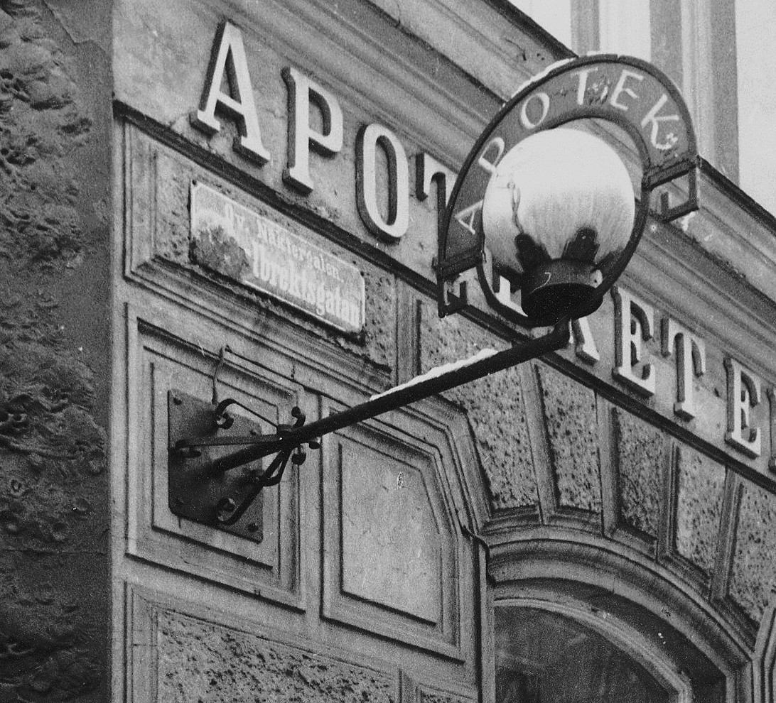 Fasadskylt för "Apoteket Elgen"